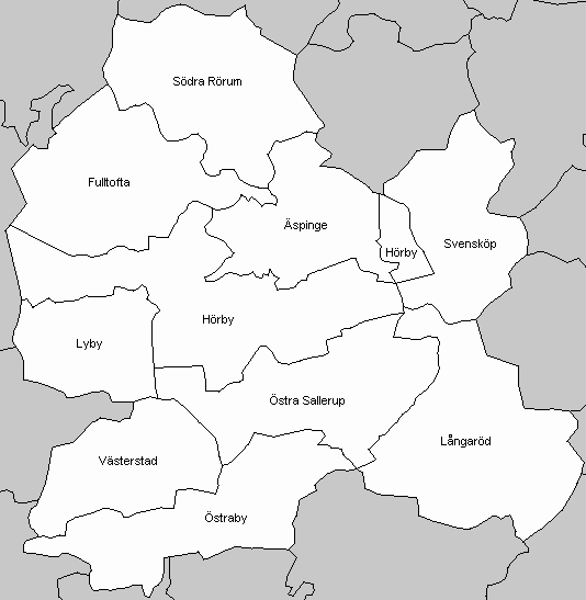 socken in Hörby